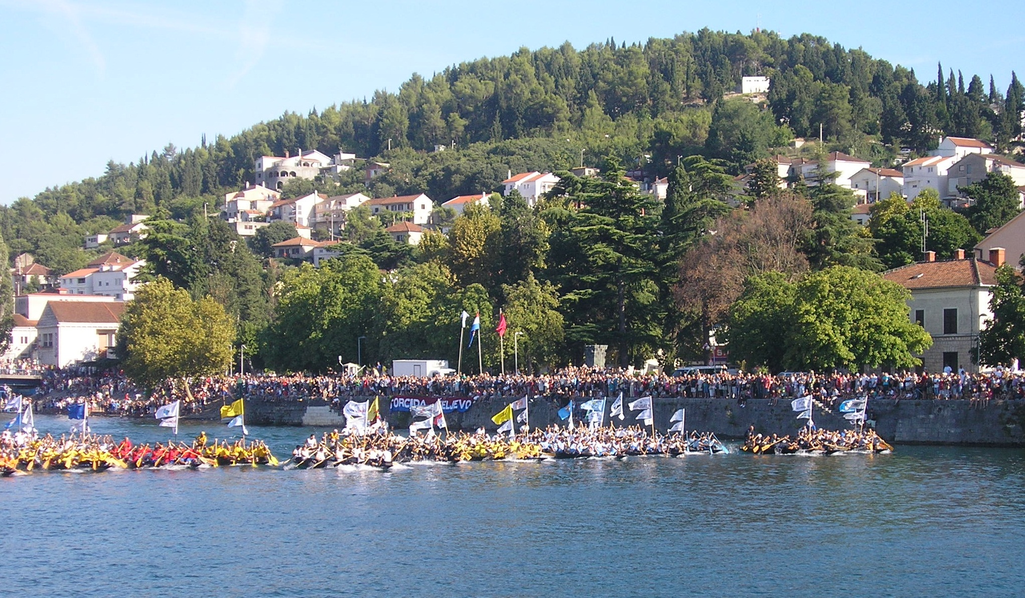 Start Maratona lađa 2011.